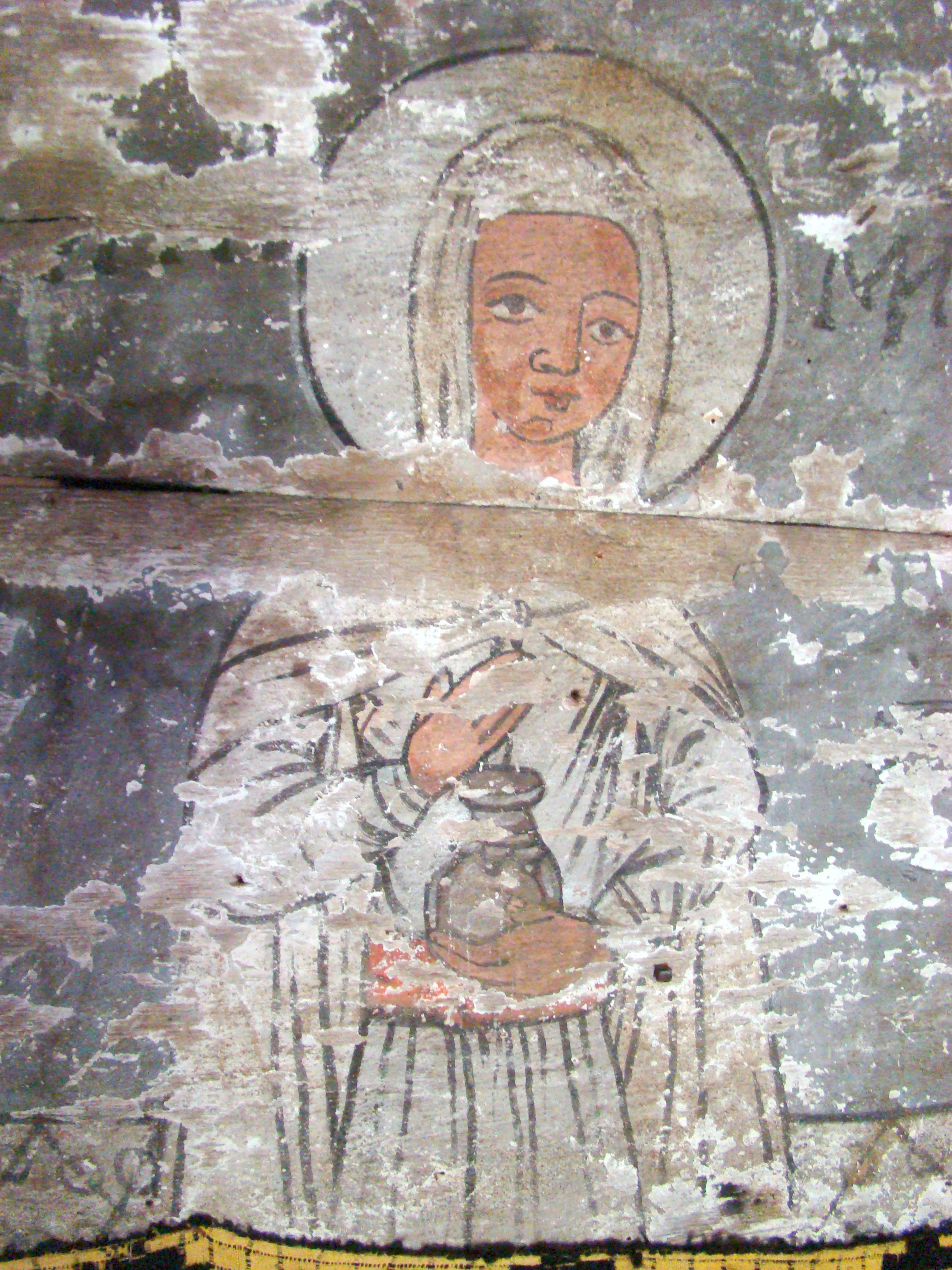 Biserica de lemn din Stolna, județul Cluj